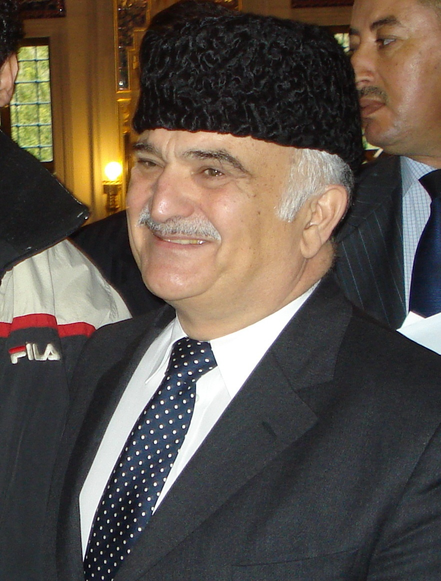 HRH Prince Hassan bin Al Talal in Berlin